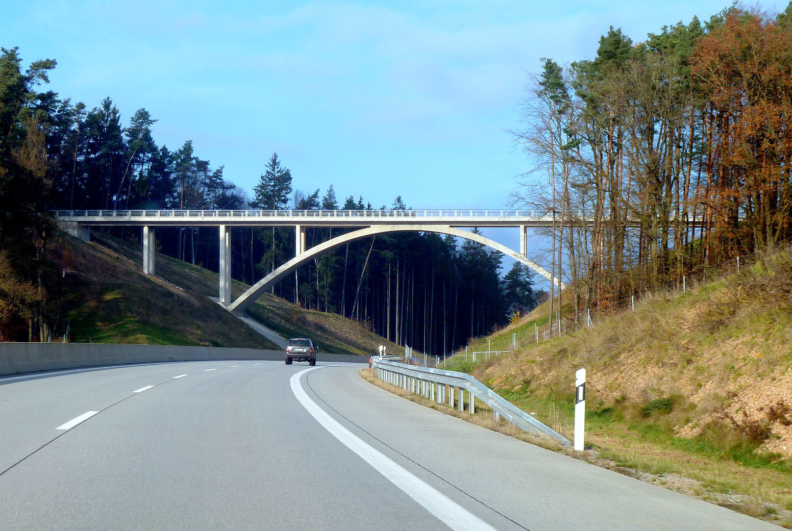 B15 neu in Fahrtrichtung Regensburg - Brücke nahe Oberndorf